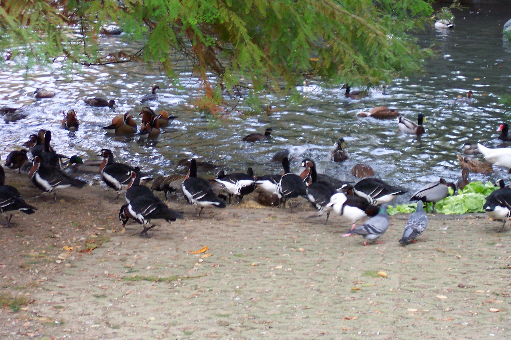 Wuppertaler Zoo, Wuppertal